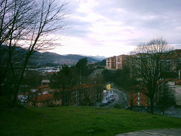 Vista general del municipio de Galdakao.